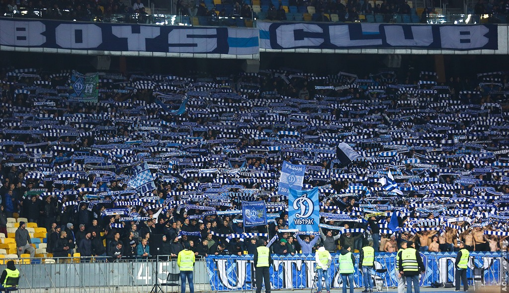 16.10.2015 г.Киев. НСК "Олимпийский". 11-й тур Лиги Пари-Матч. Динамо Киев - Шахтер Донецк - 0:3